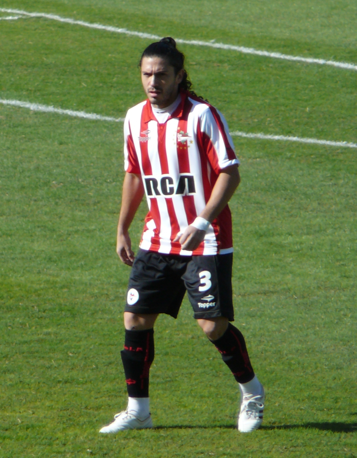 Christian Cellay, con la camiseta de Estudiantes de La Plata, enfrentando a Rosario Central.